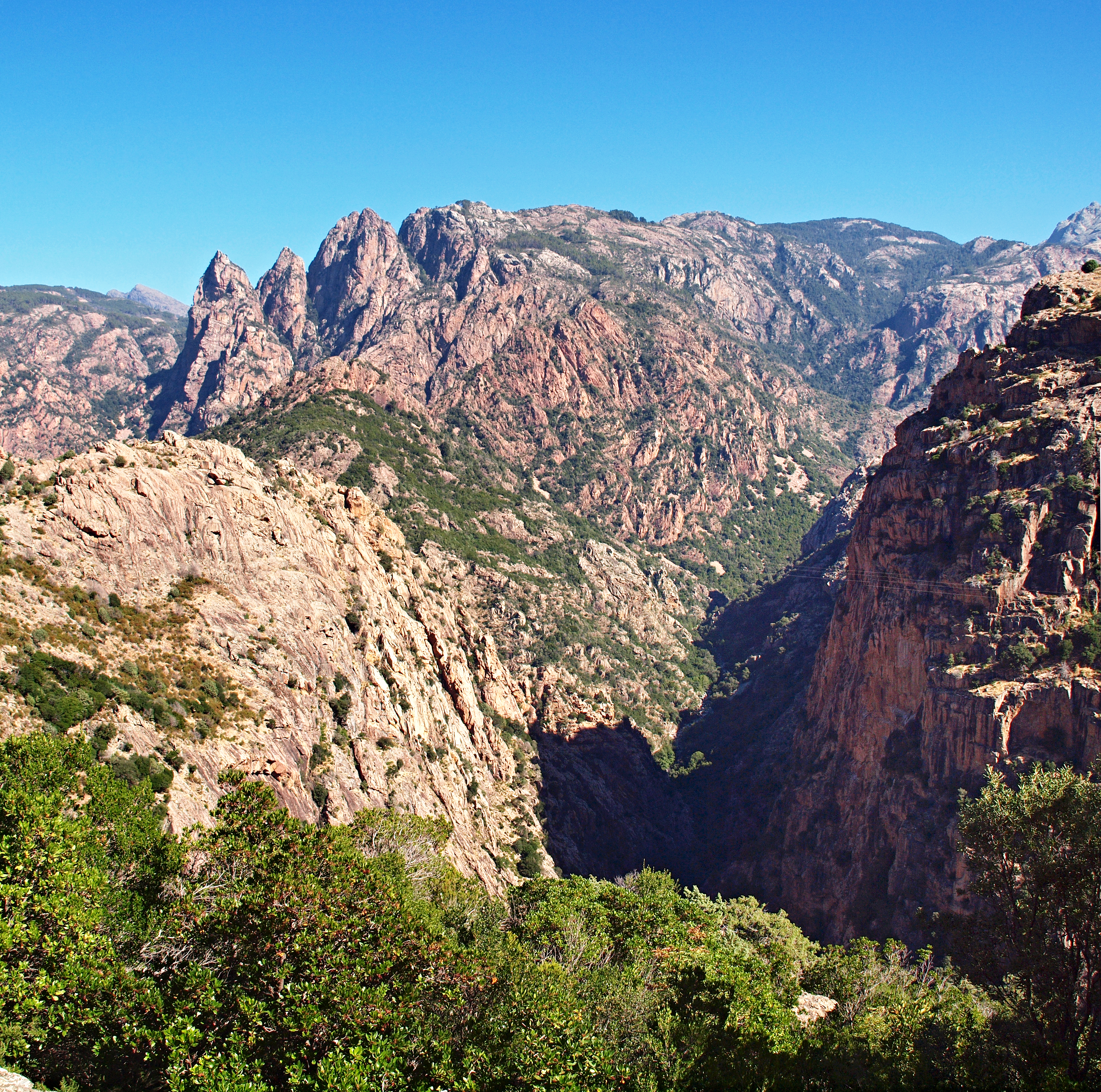 Evisa (Corsica) - Gorges de Spelunca